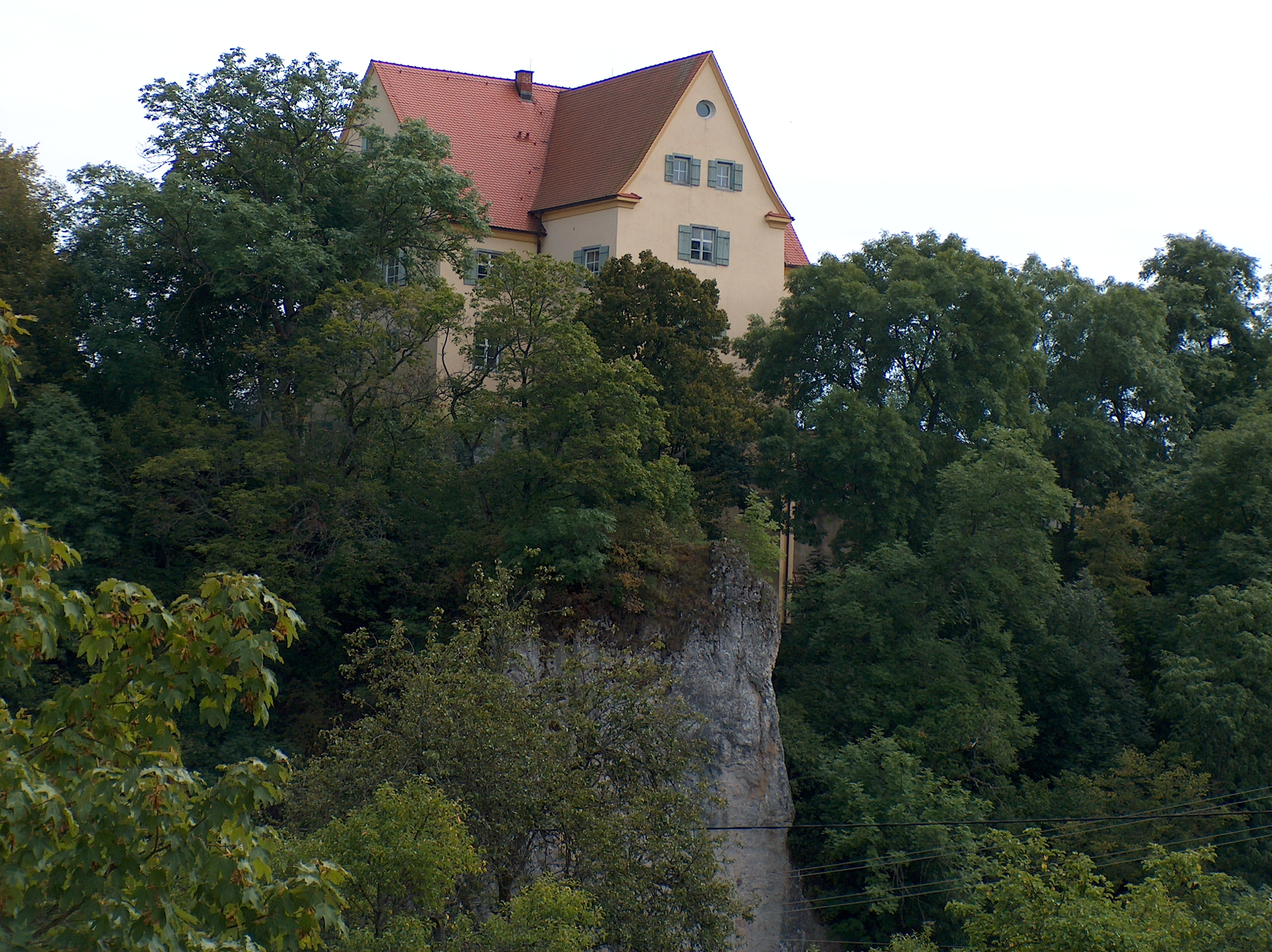 Schloss Gutenstein auf einem Felsen über dem Donautal